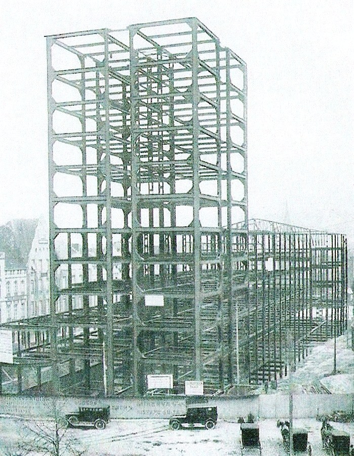 Scan einer Aufnahme des Stahlskeletts des geplanten Lochnerhauses aus dem Besitz der Familie Lochner und Nachfahren